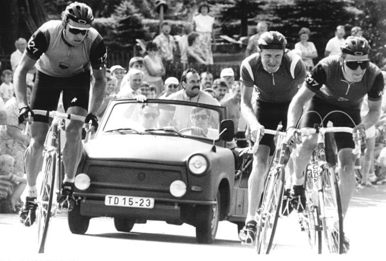 Olaf Ludwig, Jan Schur, Jens Heppner ADN-ZB Kasper 22.7.89 Bez. Karl-Marx-Stadt: DDR-Meisterschaft im Straßenfahren - Wenige Runden vor dem Ziel war noch nicht eindeutig, wer von diesen drei Fahrern den diesjährigen Meistertitel erlangt: vlnr: Olaf Ludwig (SG Wismut Gera) Jan Schur (SC DHfK Leipzig) und Jens Heppner (SG Wismut Gera). Schließlich wurde auf dem tradtitionsreichen Sachsenring Olympiasieger Olaf Ludwig mit 44 s Vorsprung im Straßeneinzelfahren.